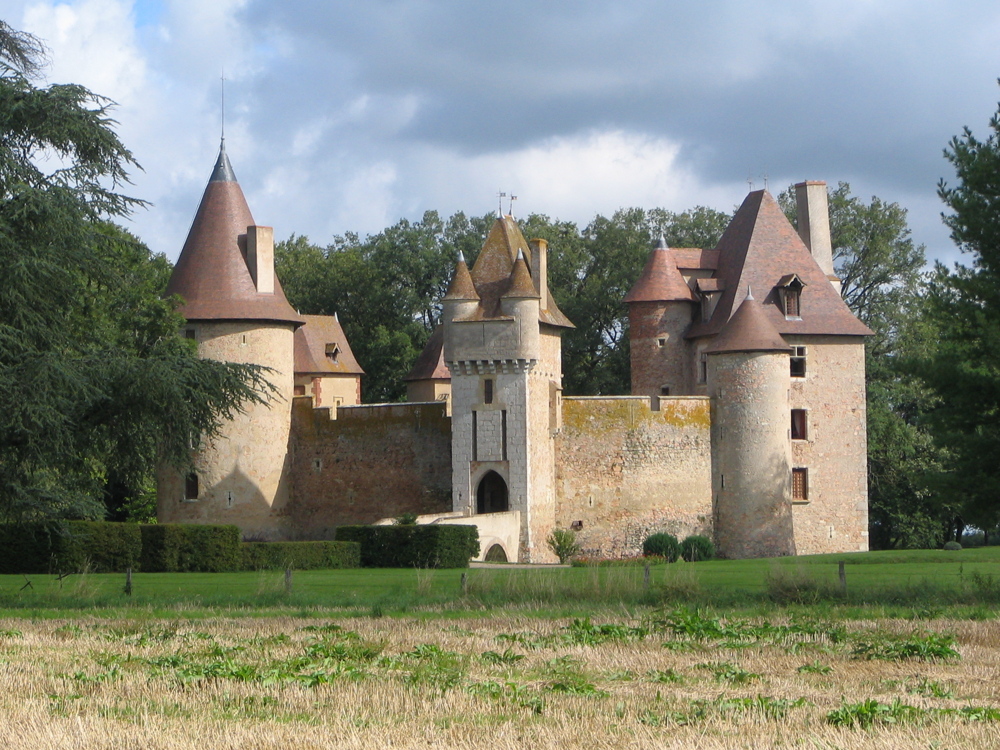 Superbe château féodal situé près de St Pourçain sur besbre dans l'Allier .